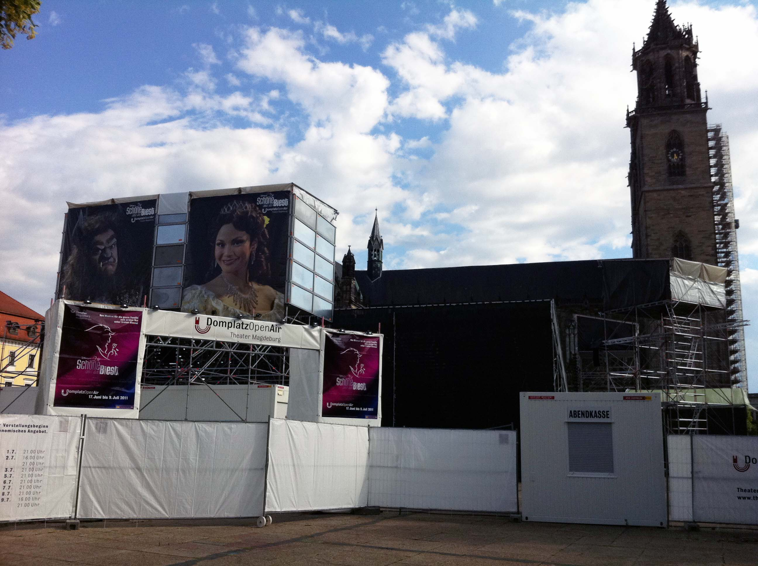 Eingangsportal zum DomplatzOpenAir 2011 in Magdeburg